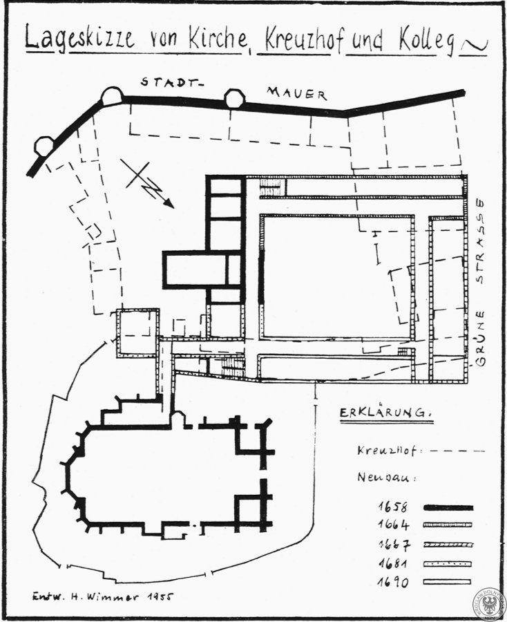 Plan kolegium jezuickiego w Kłodzku